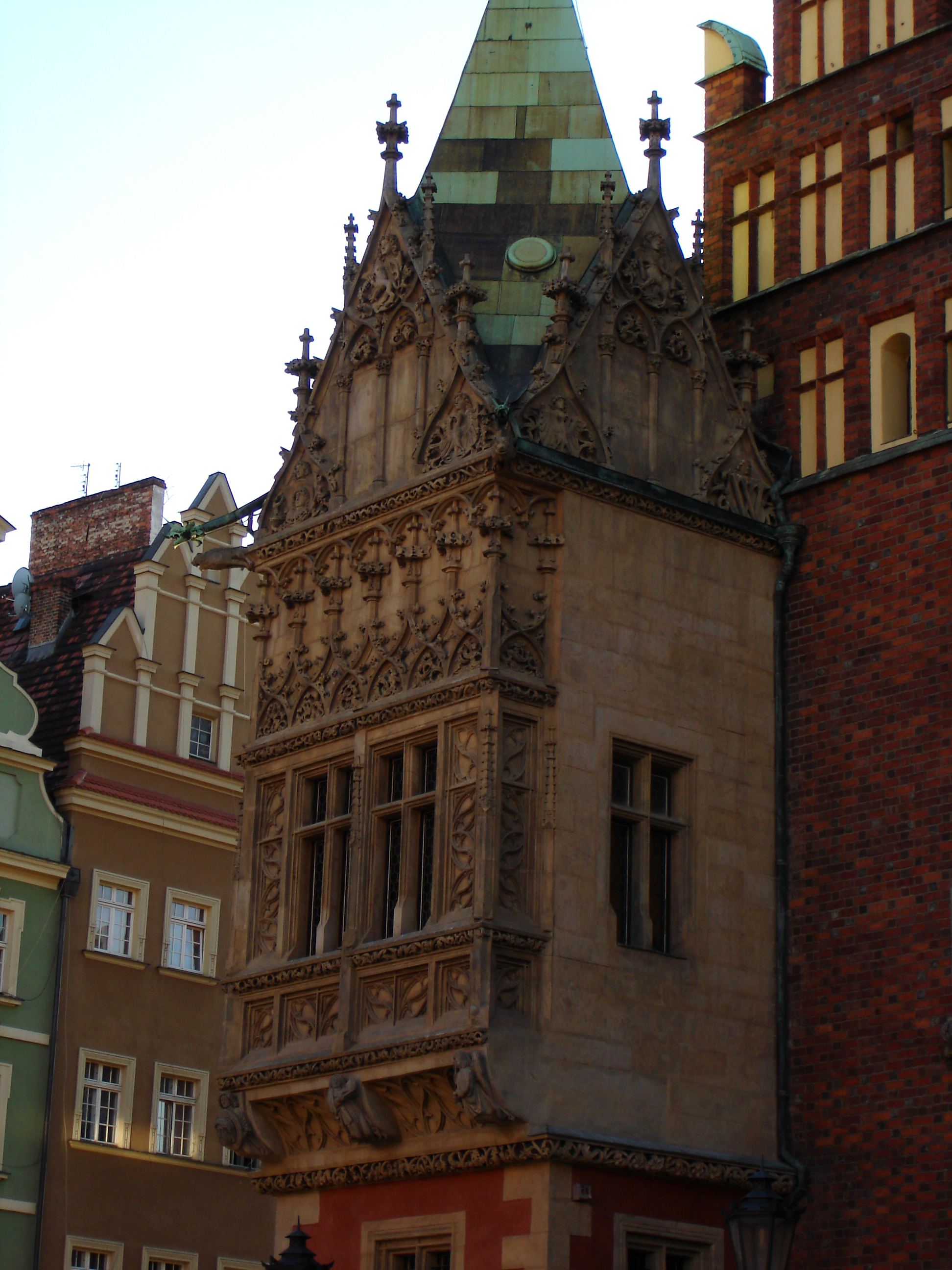 Polen: Breslauer Rathaus